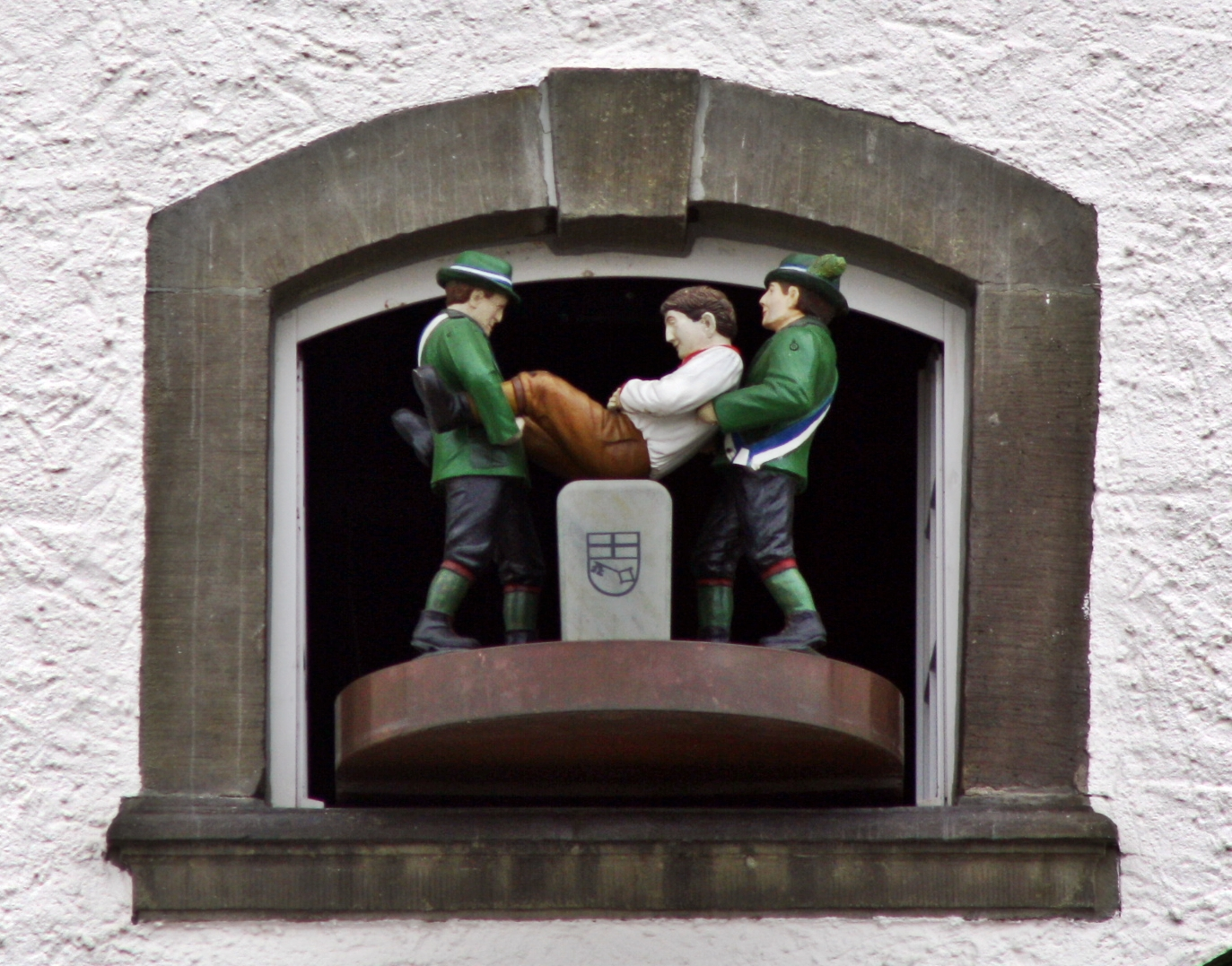 Figuren des Glockenspiels am Briloner Rathaus: Briloner Schnadezug, Stutzäsen